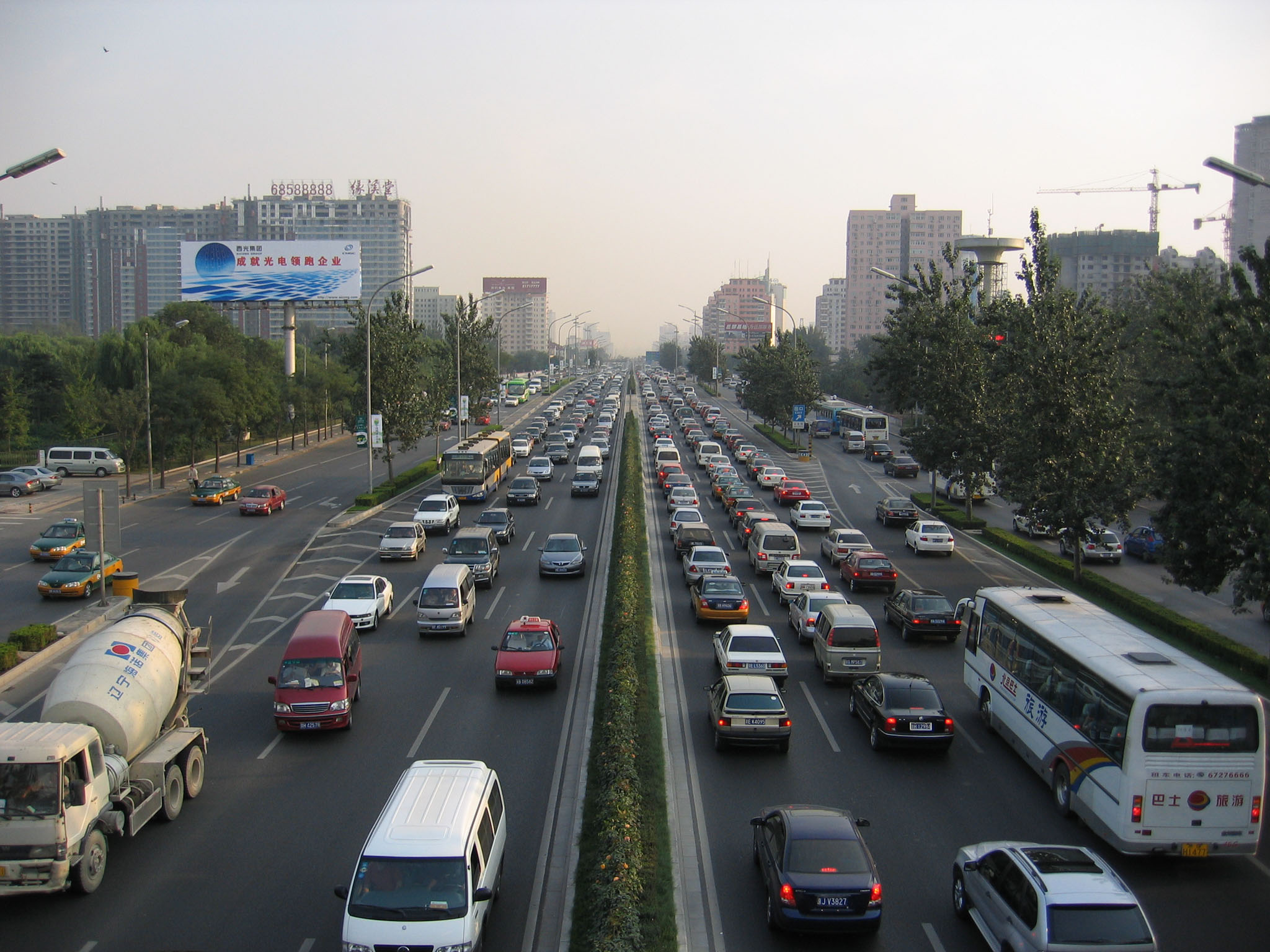 Hétfői forgalom a pekingi hármas kőrgyűrű nyugati részén